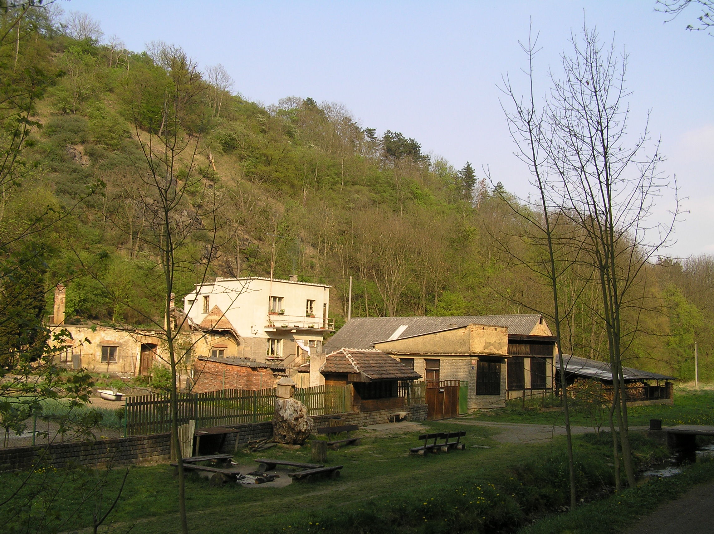 PP Vizerka